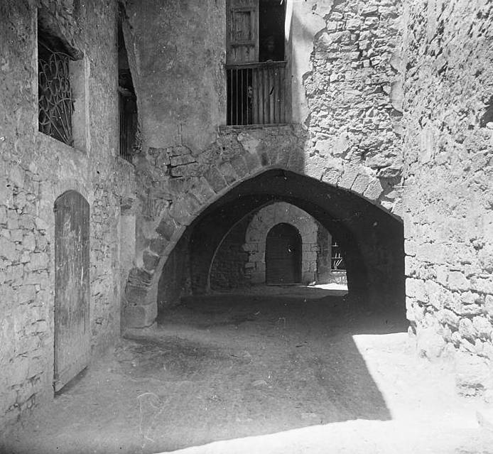 Carrer porticat. Josep Salvany i Blanch (1922)